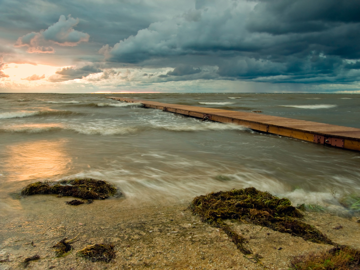 Varasügisene tuuline meri Saaremal, Leisi vallas Jõistes.